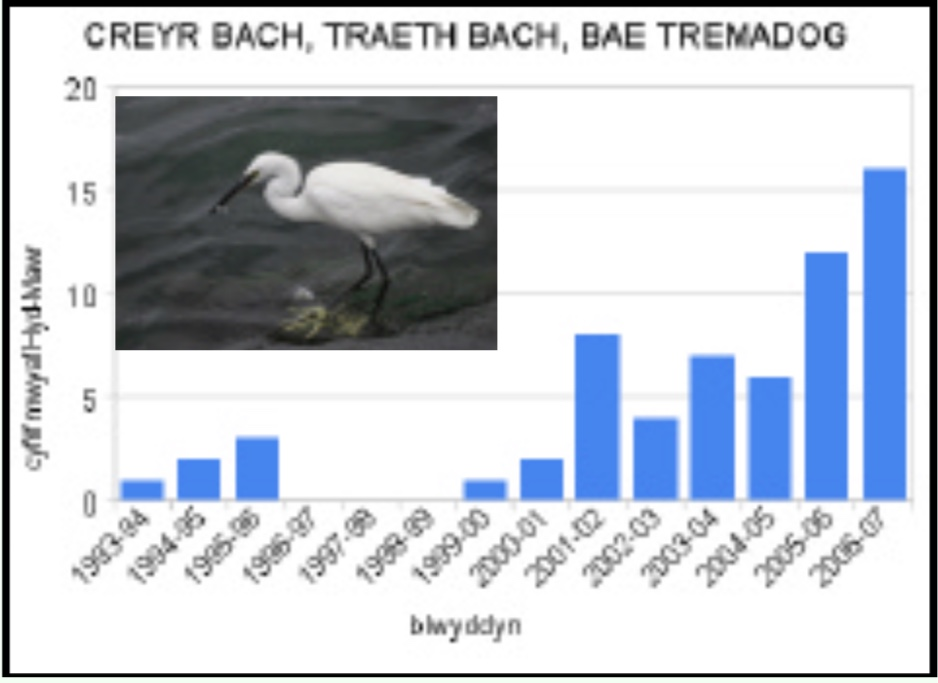 Graff o niferoedd cynyddol o grëyrod bychain ar y Traeth Bach, Bae Tremadog, o’r 1990au ymlaen